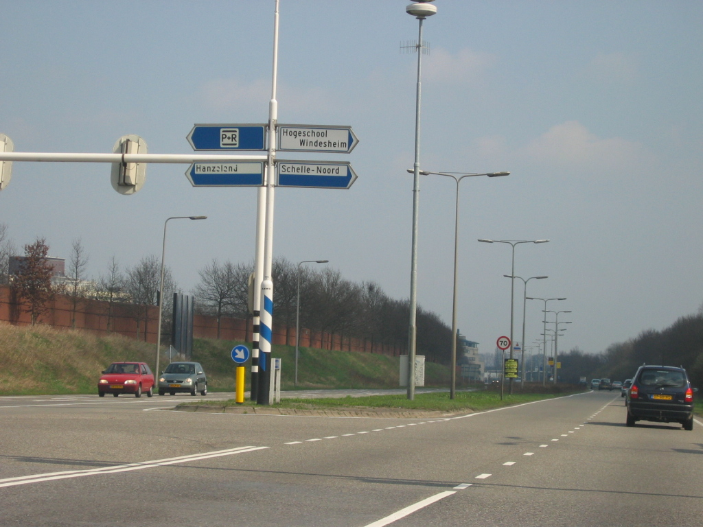 N337 IJsseallee richting zuiden